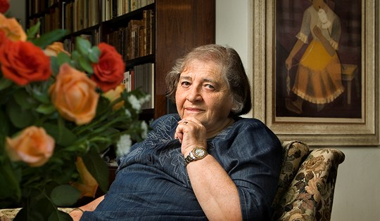 פרופסור להיסטוריה מרים ירדני